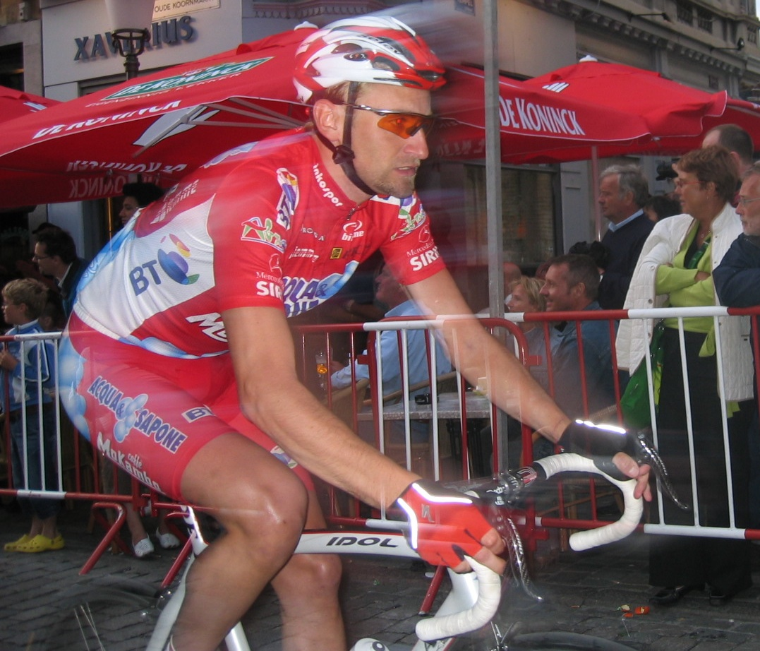 Cyclist Frank Van Den Broucke